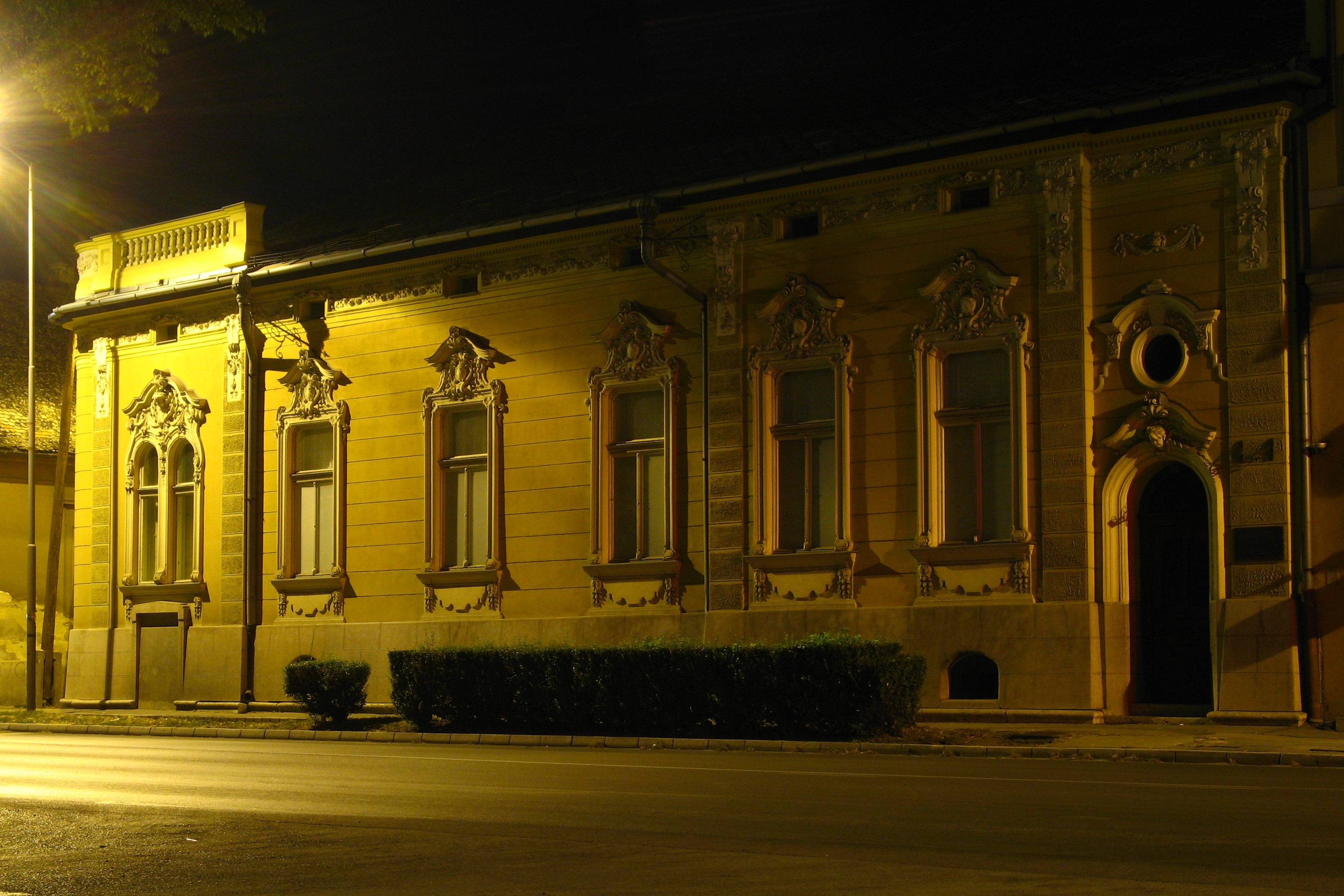 Први подаци о данашњем објекту датирају с краја 19. века, када је њен власник био адвокат Михаљ Гереб. Током 1894. године урађена је адаптација Геребове куће према пројектима Марцела Комора и Деже Јакаба, будимпештанских архитеката. Током адаптације кућа је добила раскошну необарокну декорацију. Од 2006. године у њој се налази општинска установа културе - Галерија „Др Винко Перчић“.